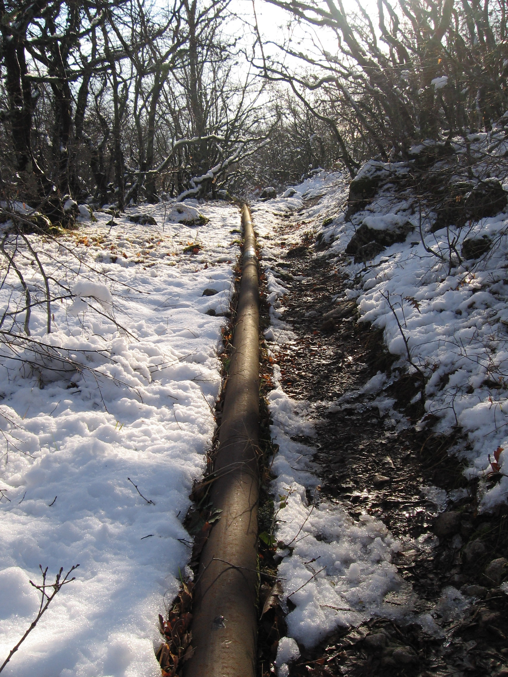 Водогін